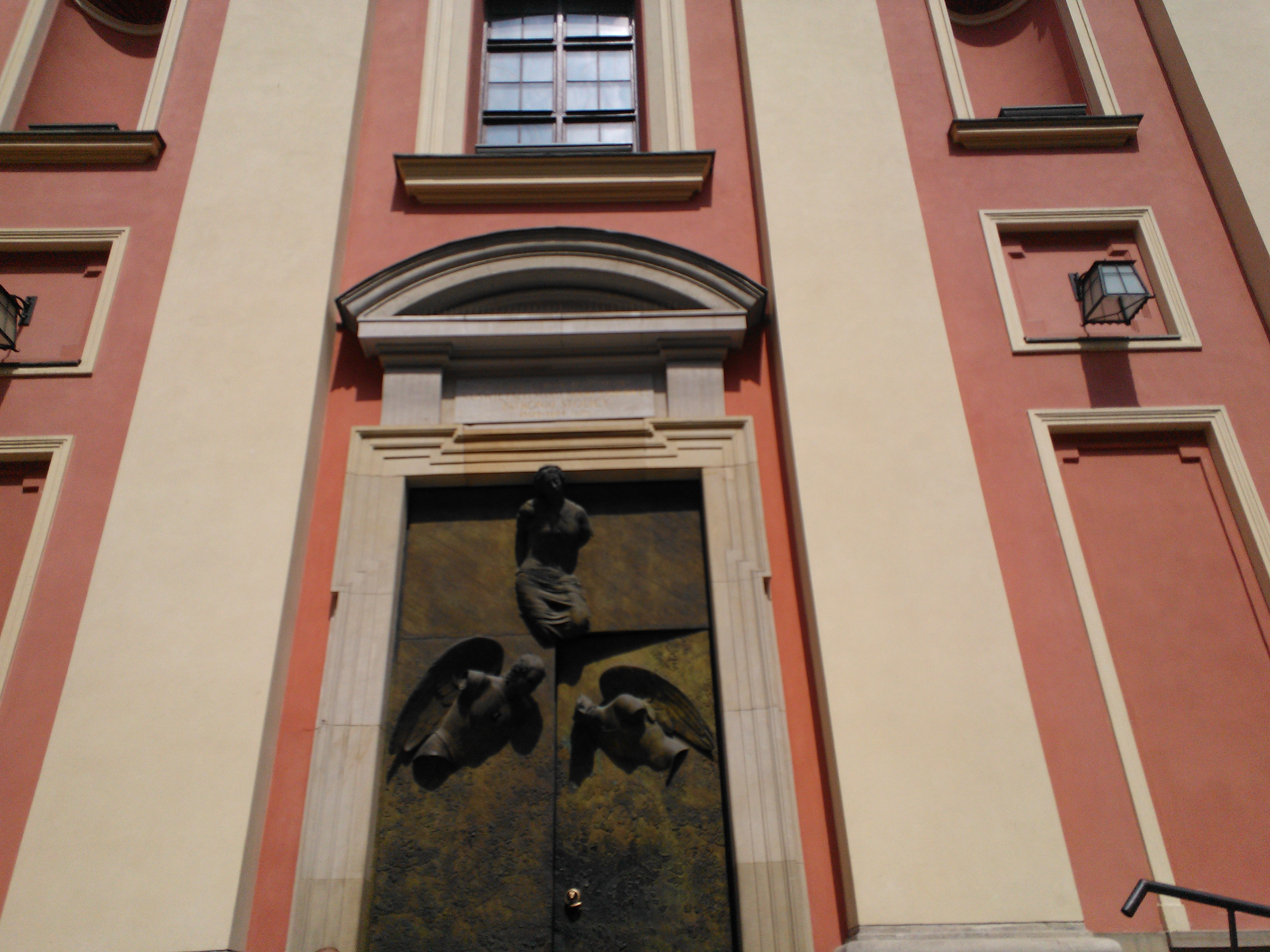 anielskie drzwi w Kościele Matki Bożej Łaskawej w Warszawie